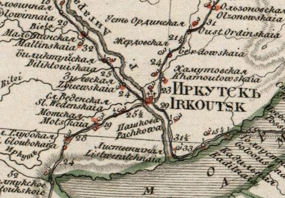 Фрагмент генеральной карты Иркутской губернии 1826 года